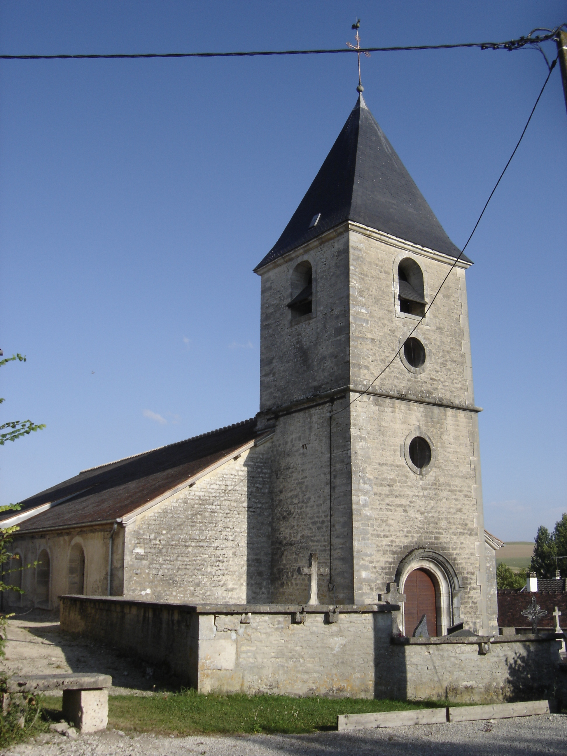 église d'Urville - Aube - France